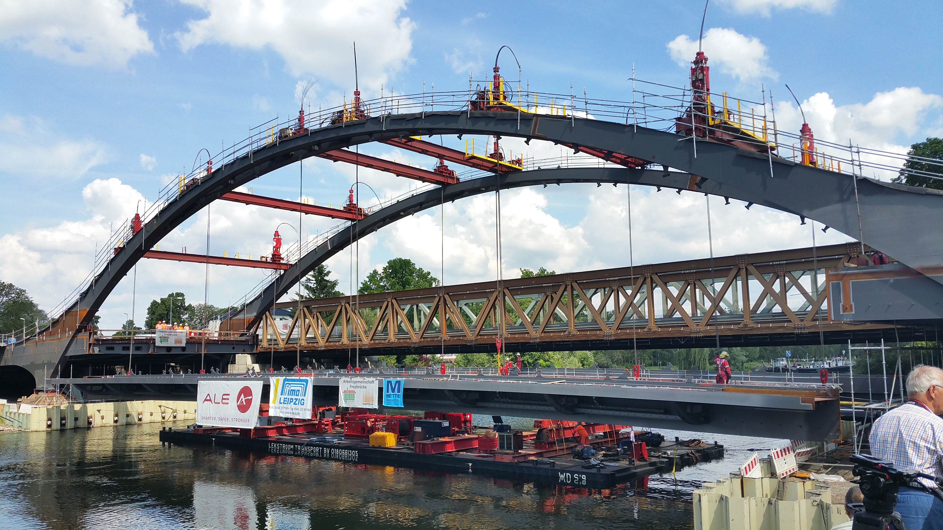 Freybrücke Stromfeld wird eingehangen